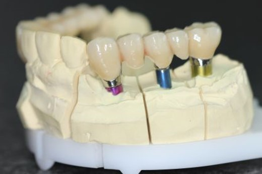 Laborsituation einer Implnatatbrücke auf 3 Implantaten